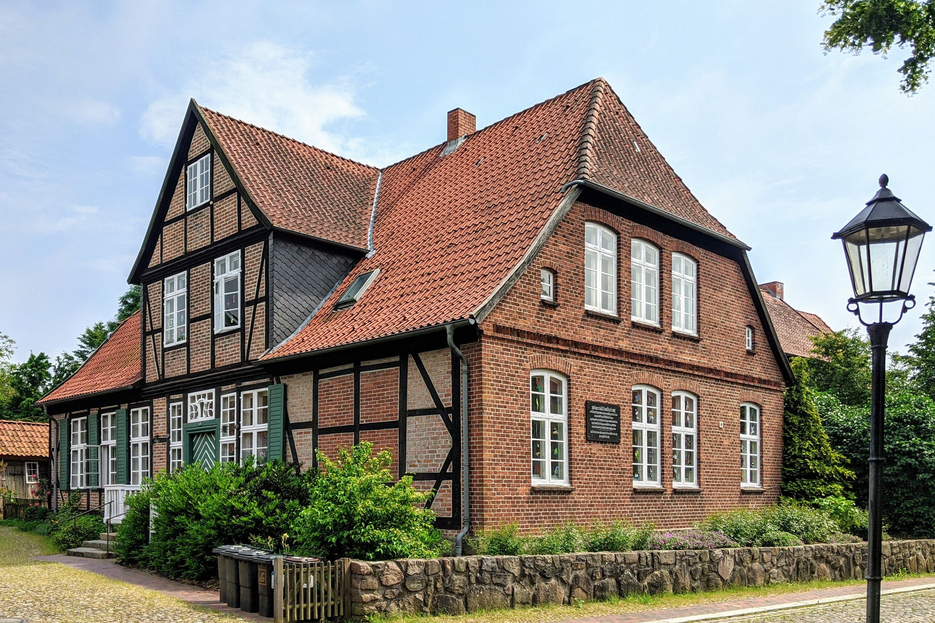 Baudenkmal Domhof 40 (ehem. Direktorenhaus/Domschule) in Ratzeburg